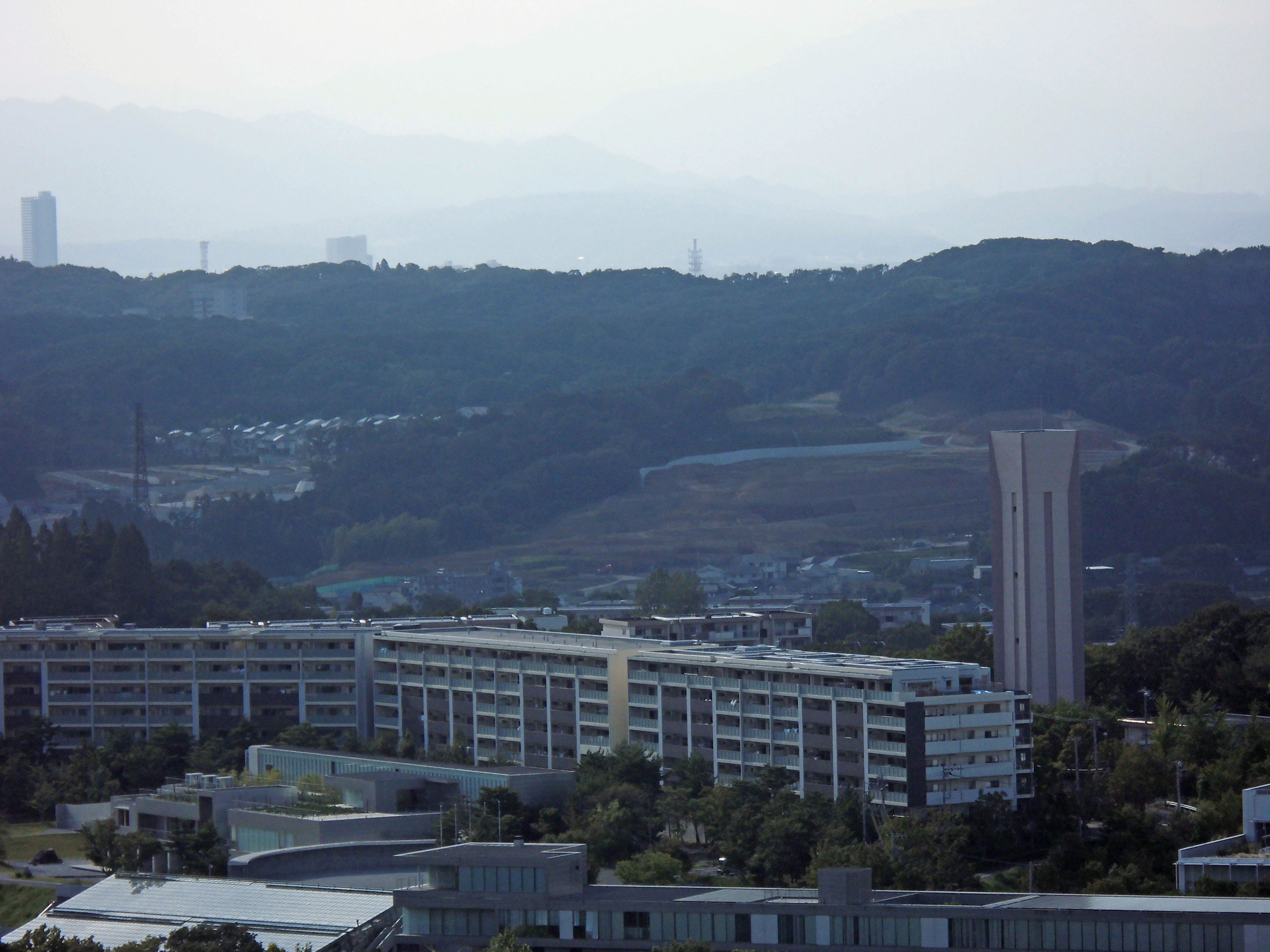 開発中の多摩ニュータウン第19住区（ベネッセビル展望台より13年8月18日撮影）